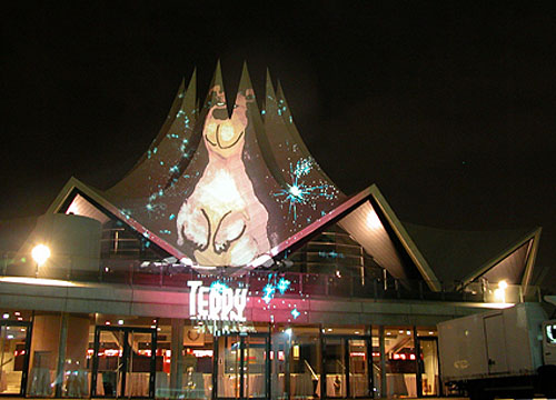 Teddy Award Filmpreis-Verleihung (Berlinale) im Tempodrom Berlin, Februar 2002. Dia & Beleuchtung auf Dach mit der Zeichnung von Ralf König.